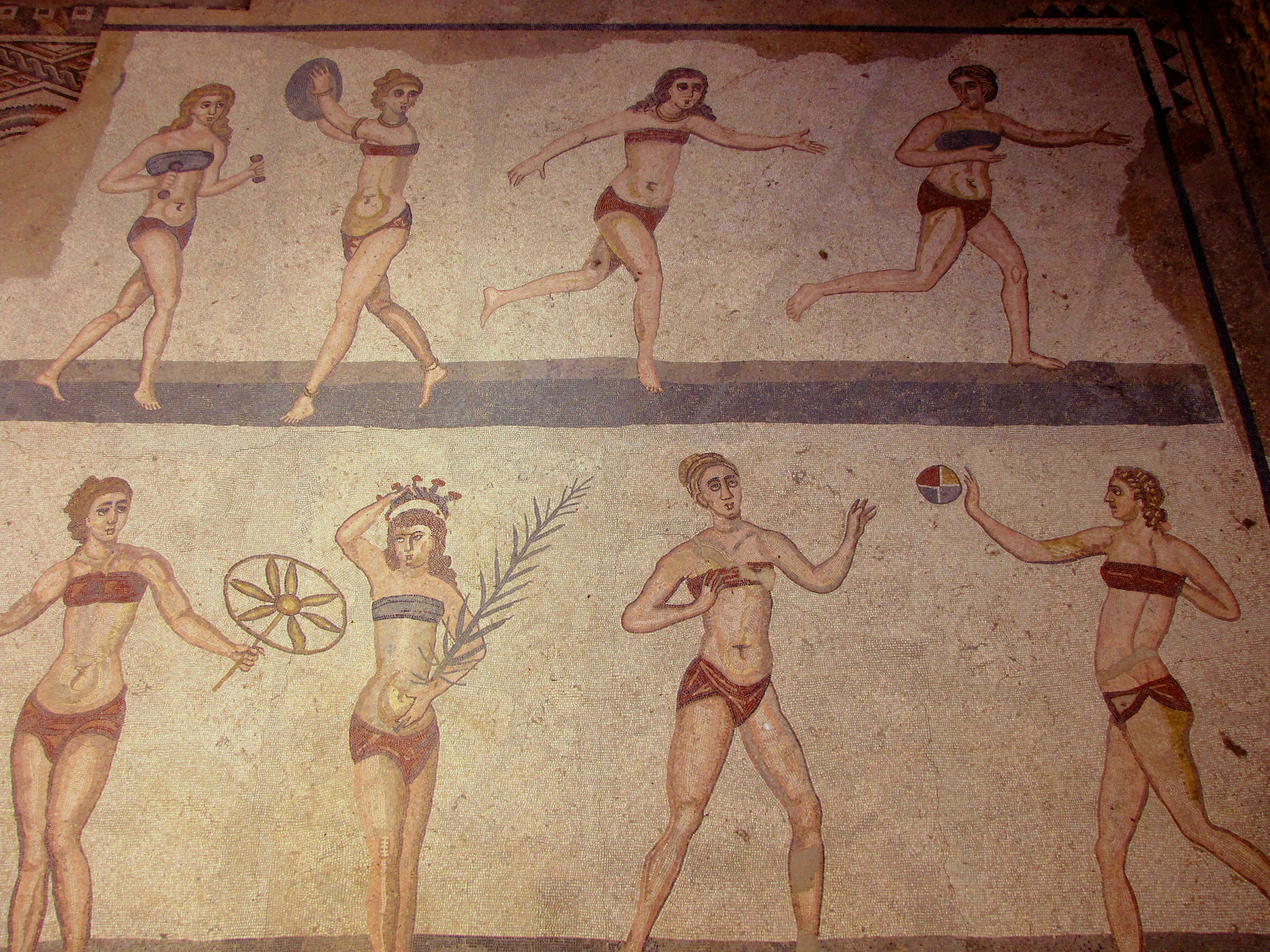 Mosaici Piazza Armerina